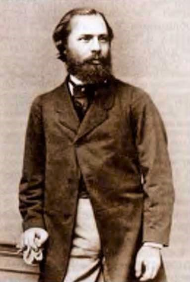 Aleksandr Aleksandrovič Slepcov (1836-1906)